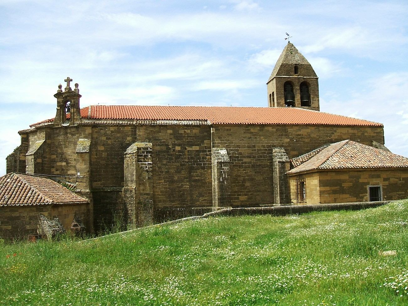 Vista desde la loma del Castillo de la Iglesia parroquial de Santa María la Mayor, San Vicente de la Sonsierra, La Rioja, España/Spain